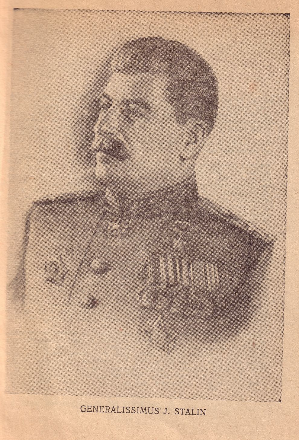 Generalissimus Józef Stalin